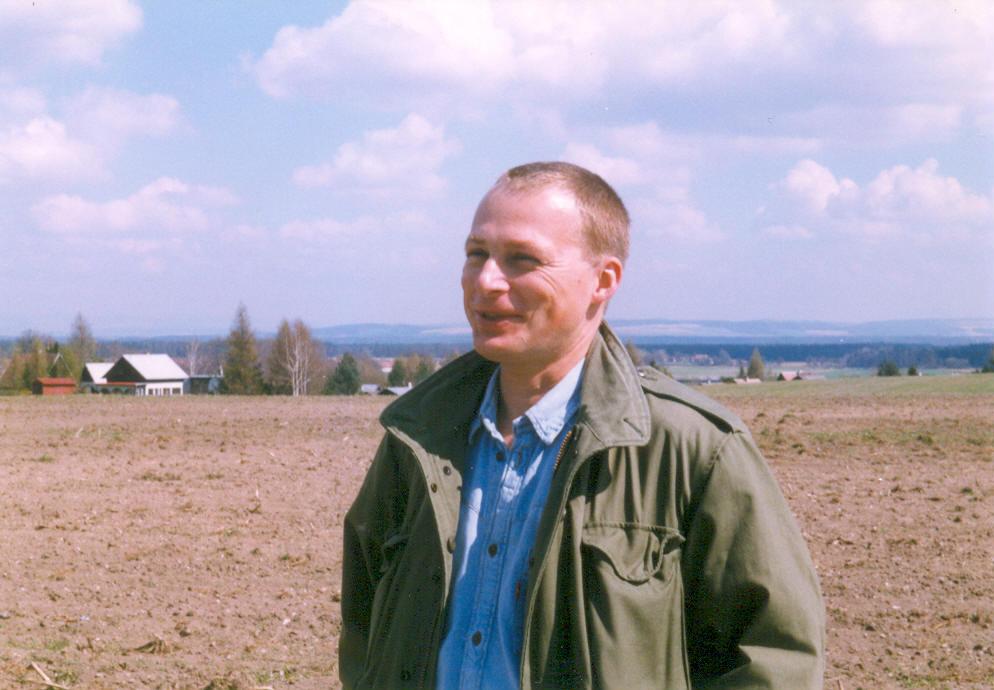 spisovatel Vladimír Šlechta